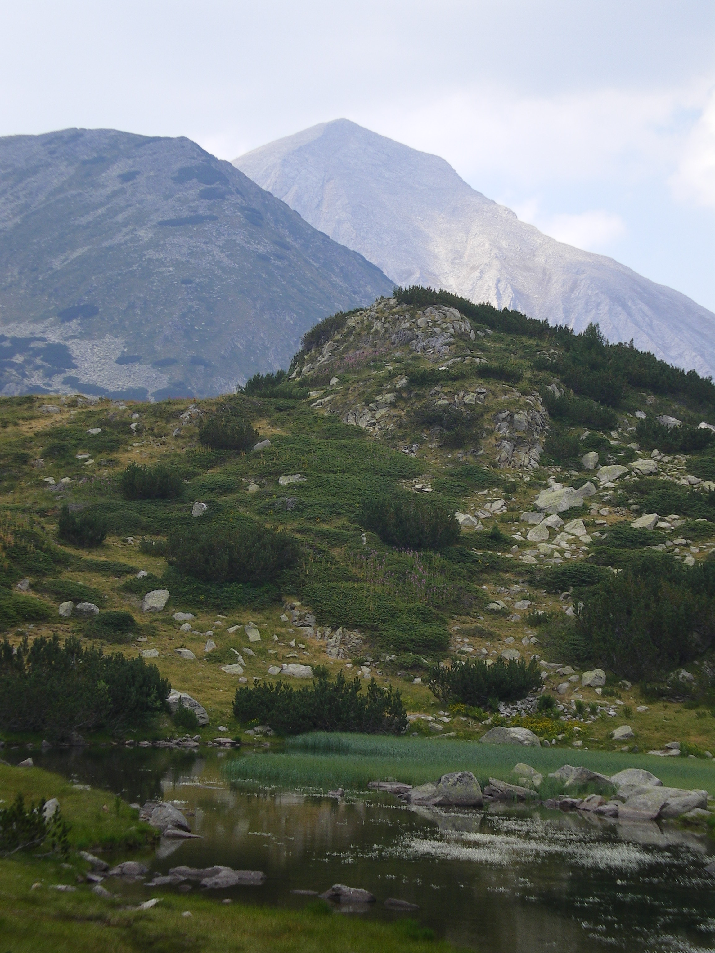 Vihren from Banderishko lake